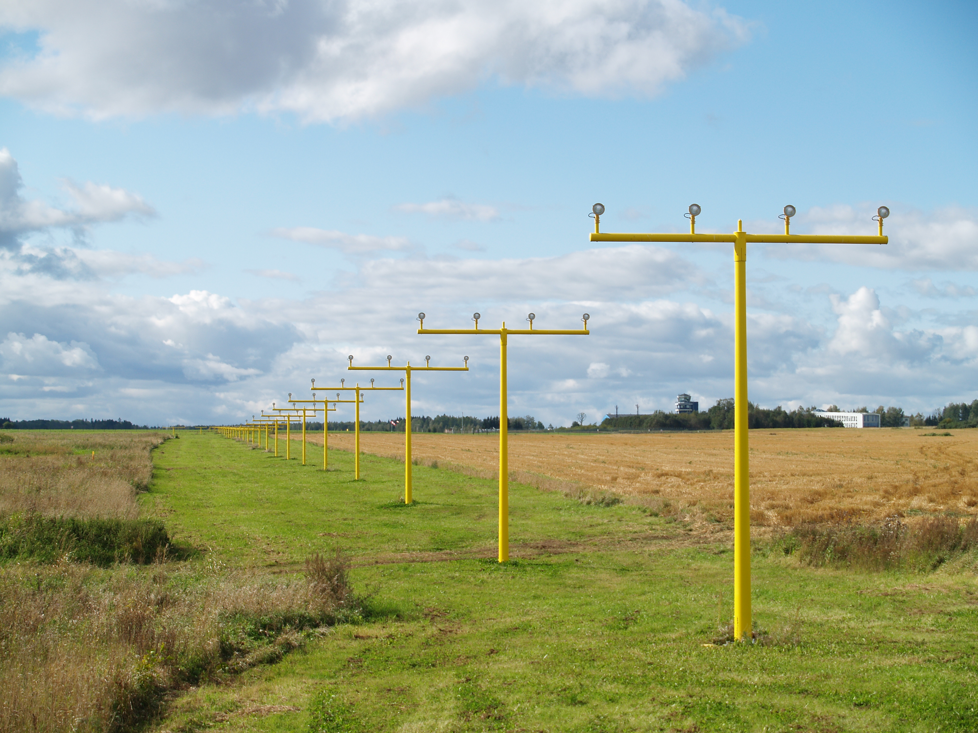 Tartu lennujaama lennuraja maanteepoolne osa.